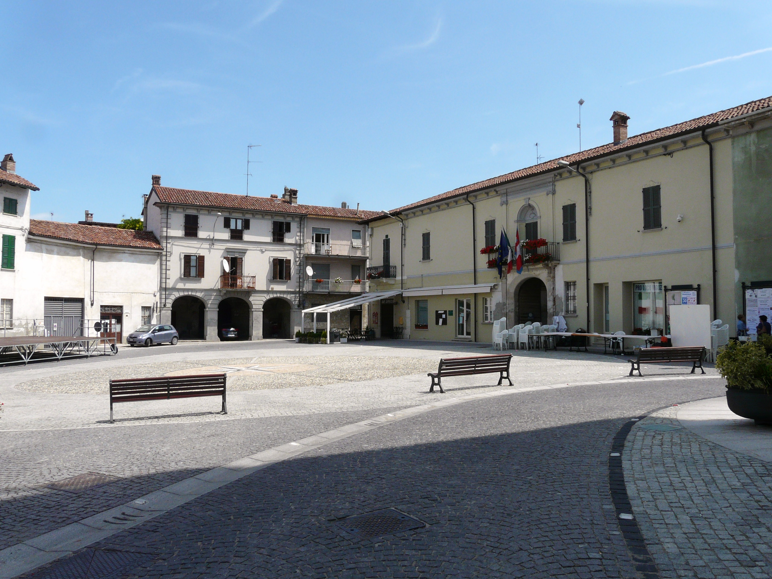 Piazza Libertà, Viguzzolo, Piemonte, Italia